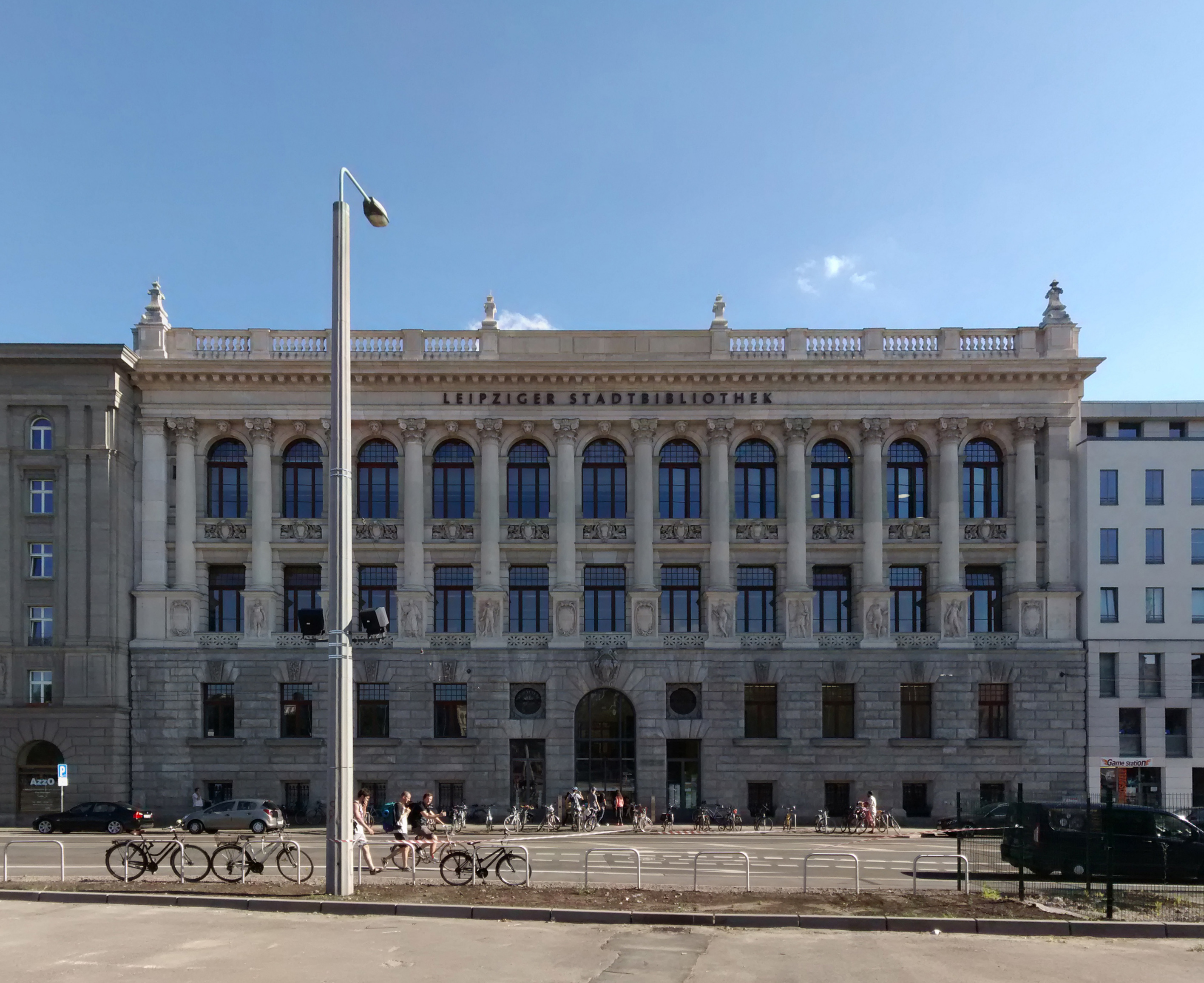 Stadtbibliothek Leipzig (ehemaliges Gebäude des Grassimuseums) am Wilhelm-Leuschner-Platz (ehemaliger Königsplatz), Hugo Licht, Juni 2016